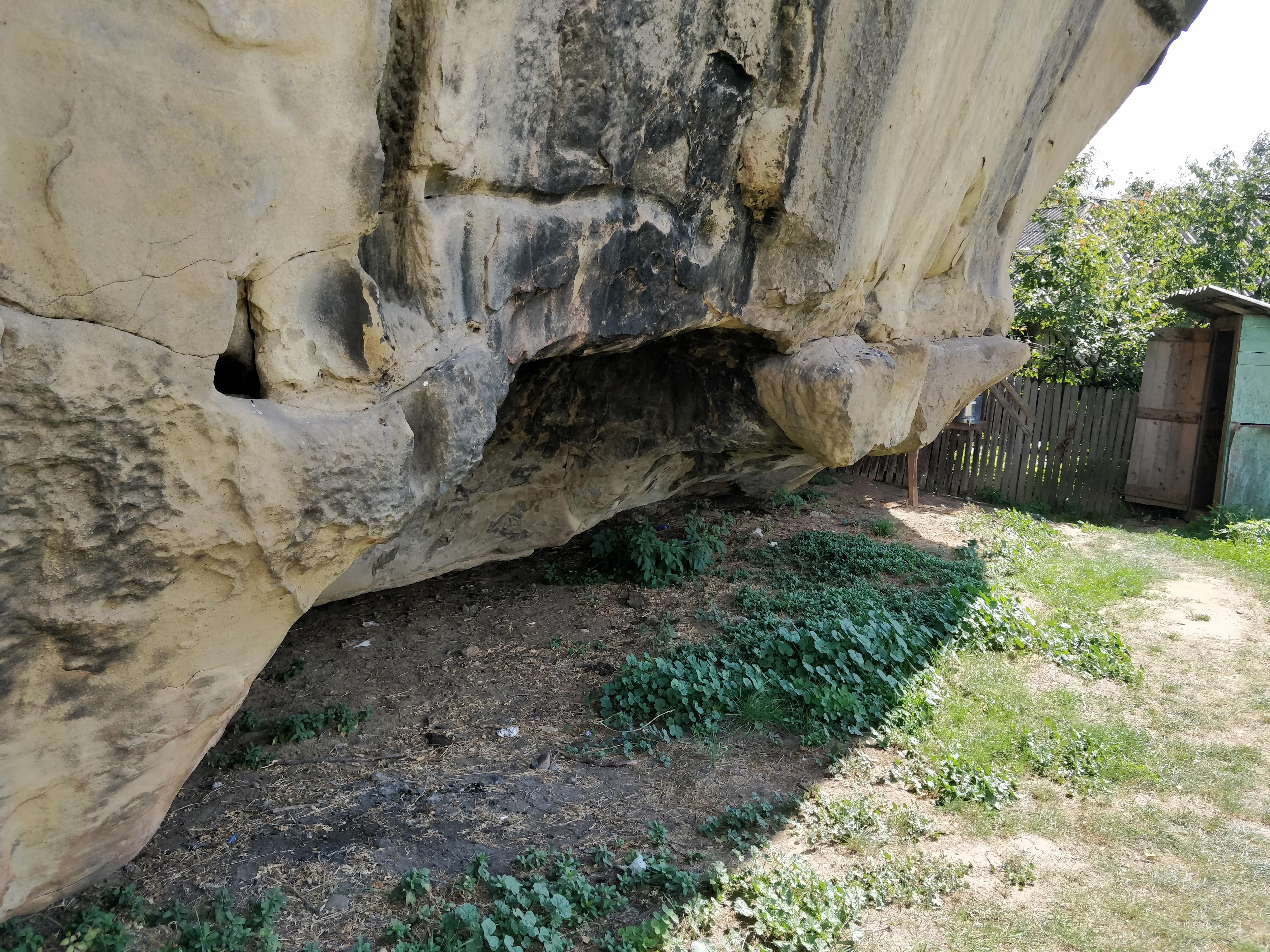 Ruinele chiliilor rupestre 02